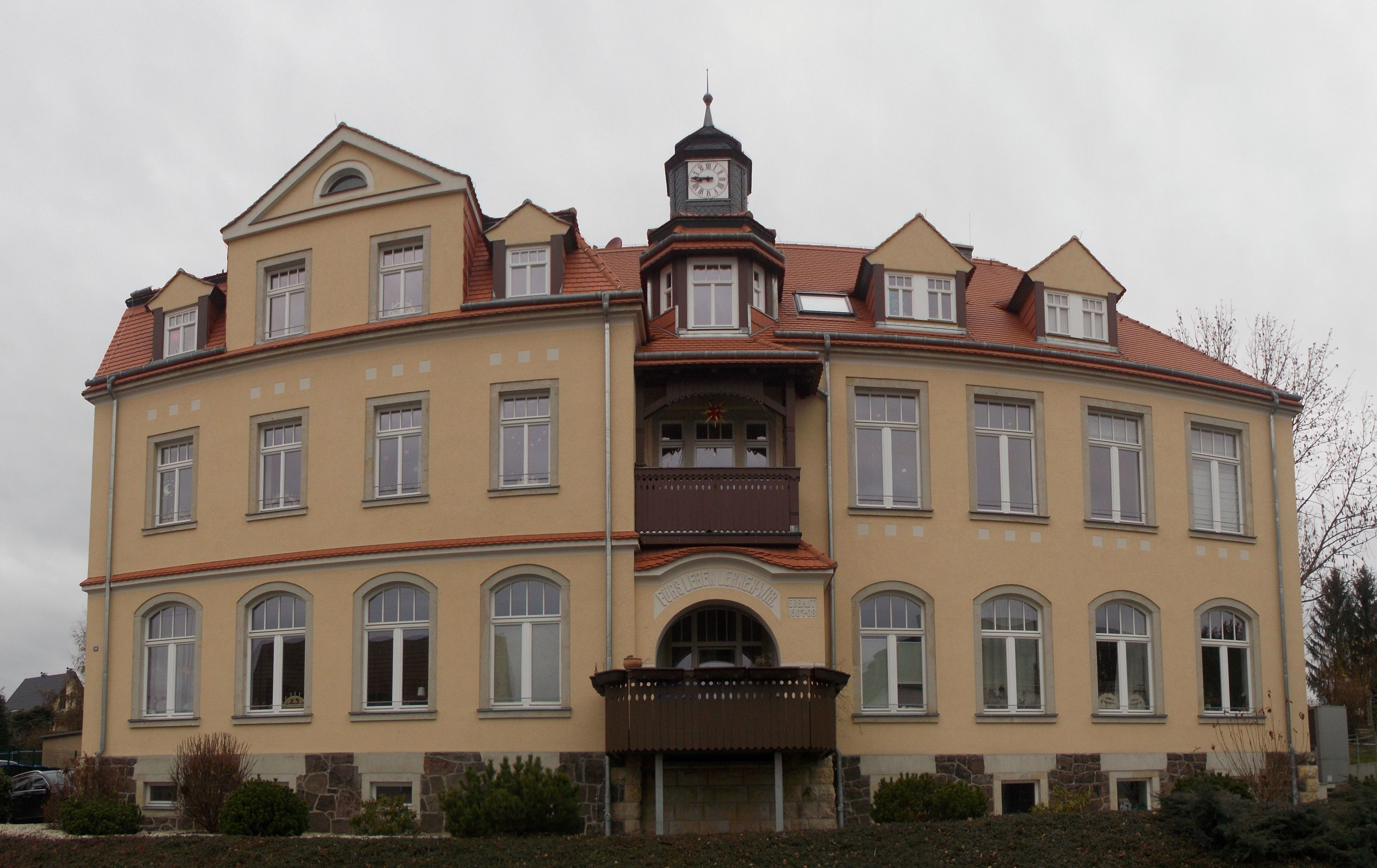 Ehemalige Schule Wurgwitz (Neue Schule Freital?)